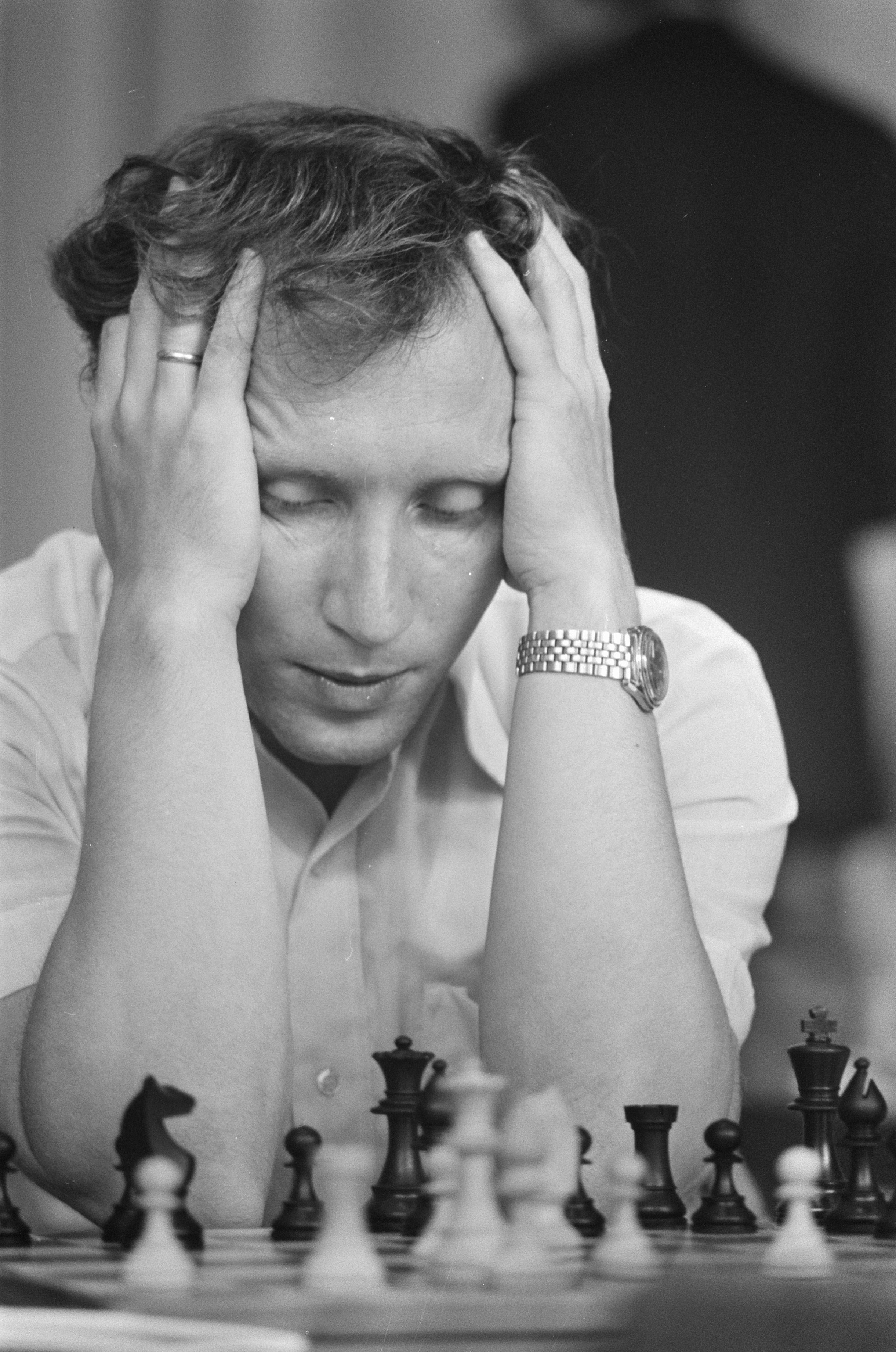 Collectie / Archief : Fotocollectie Anefo Reportage / Serie : [ onbekend ] Beschrijving : IBM-schaaktoernooi 9e ronde, nr. 30, 31 Tukmakov, Datum : 26 juli 1974 Trefwoorden : schaken Instellingsnaam : IBM-Schaaktoernooi Fotograaf : Peters, Hans / Anefo Auteursrechthebbende : Nationaal Archief Materiaalsoort : Negatief (zwart/wit) Nummer archiefinventaris : bekijk toegang 2.24.01.05 Bestanddeelnummer : 927-3527